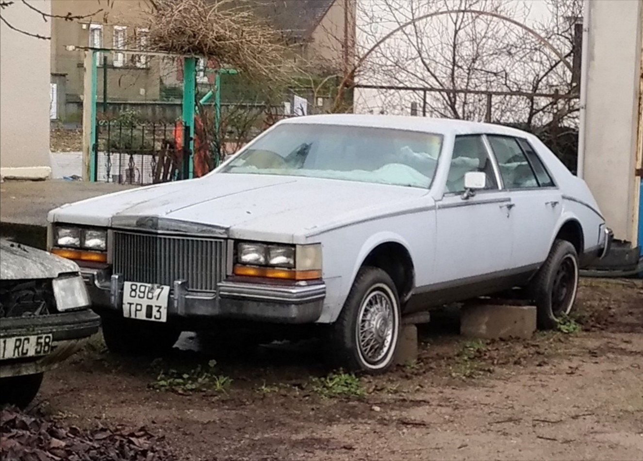 Cadillac Seville 1981